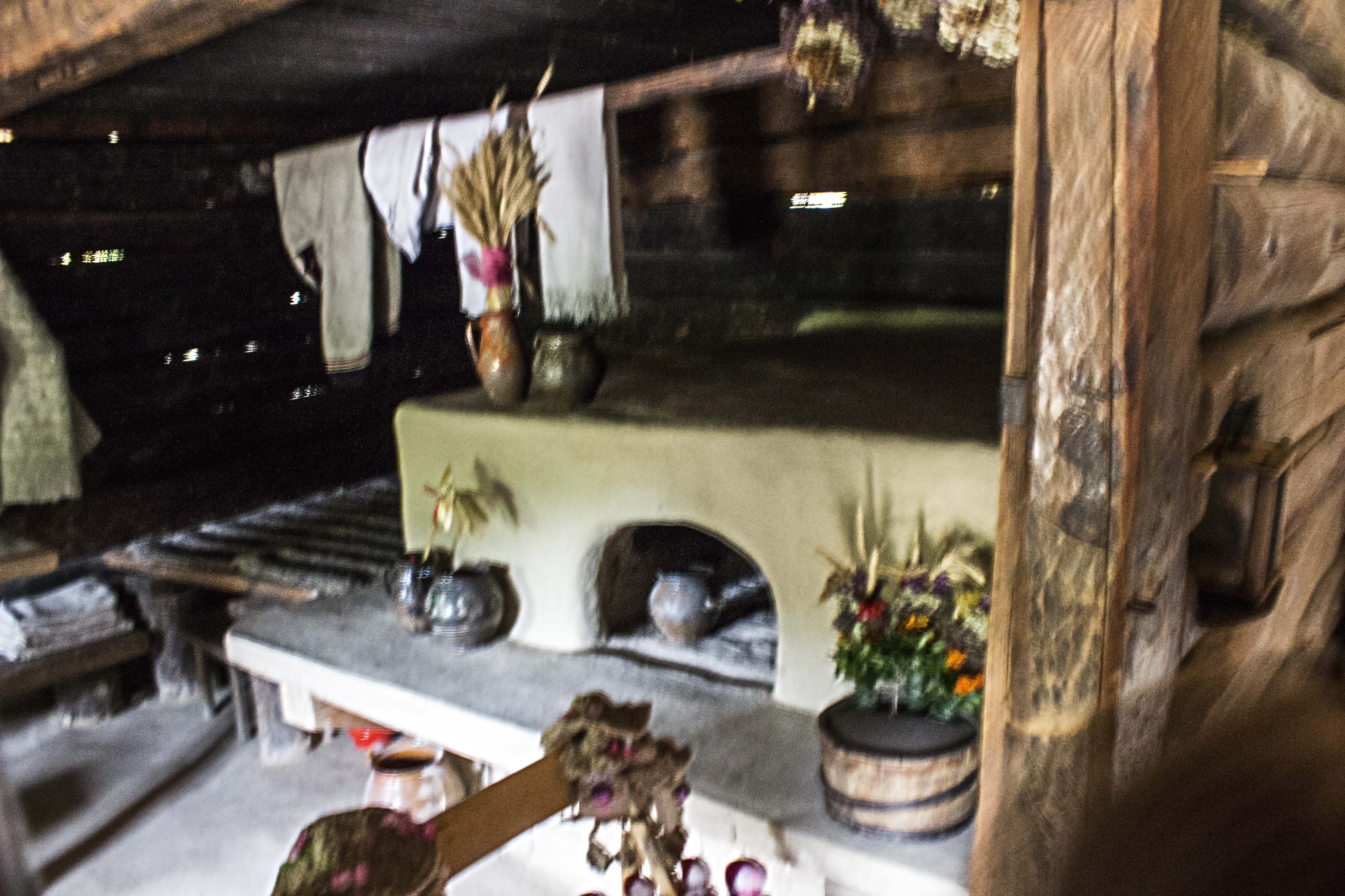 Водяний млин із села Пилипець Міжгірського району Закарпатської області, Київ, Пирогів